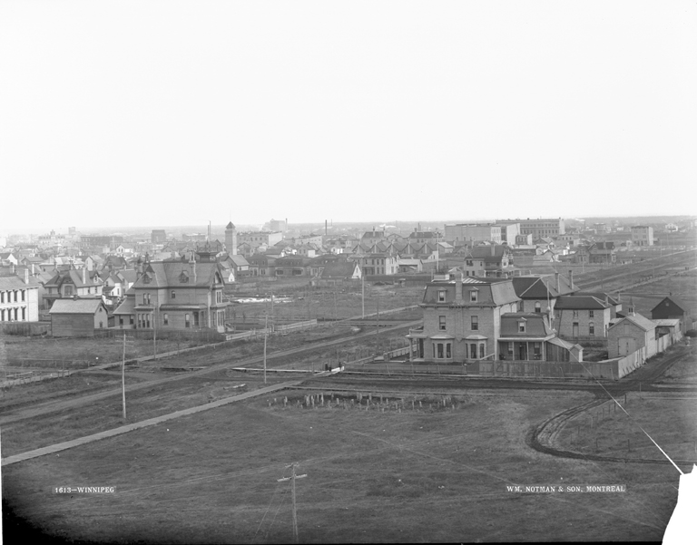 Winnipeg, Manitoba, Canada.